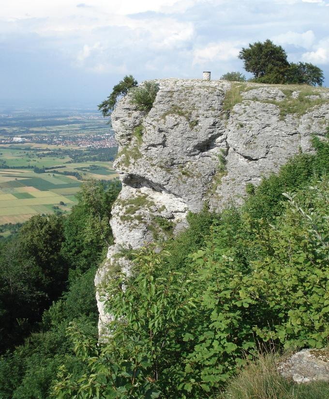 Ein Vorsprung des Breitenstein mit Blick ins Tal